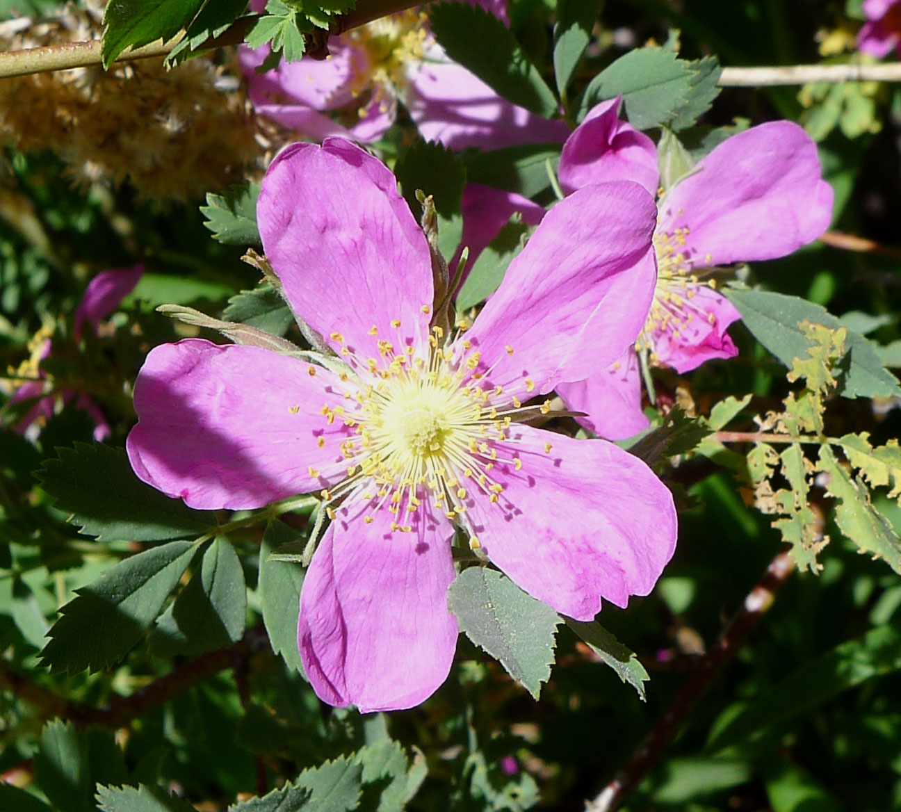 Woods' Rose (Rosa woodsii)?